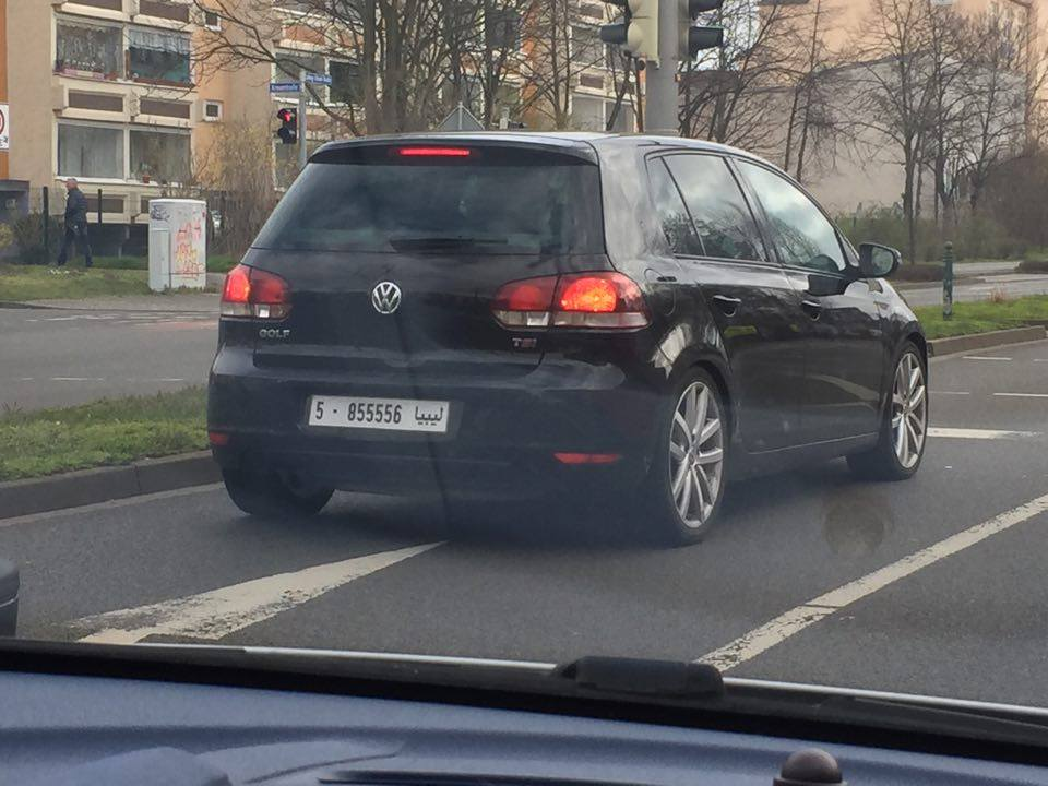 Libysches Kfz-Kennzeichen gesehen in Leipzig